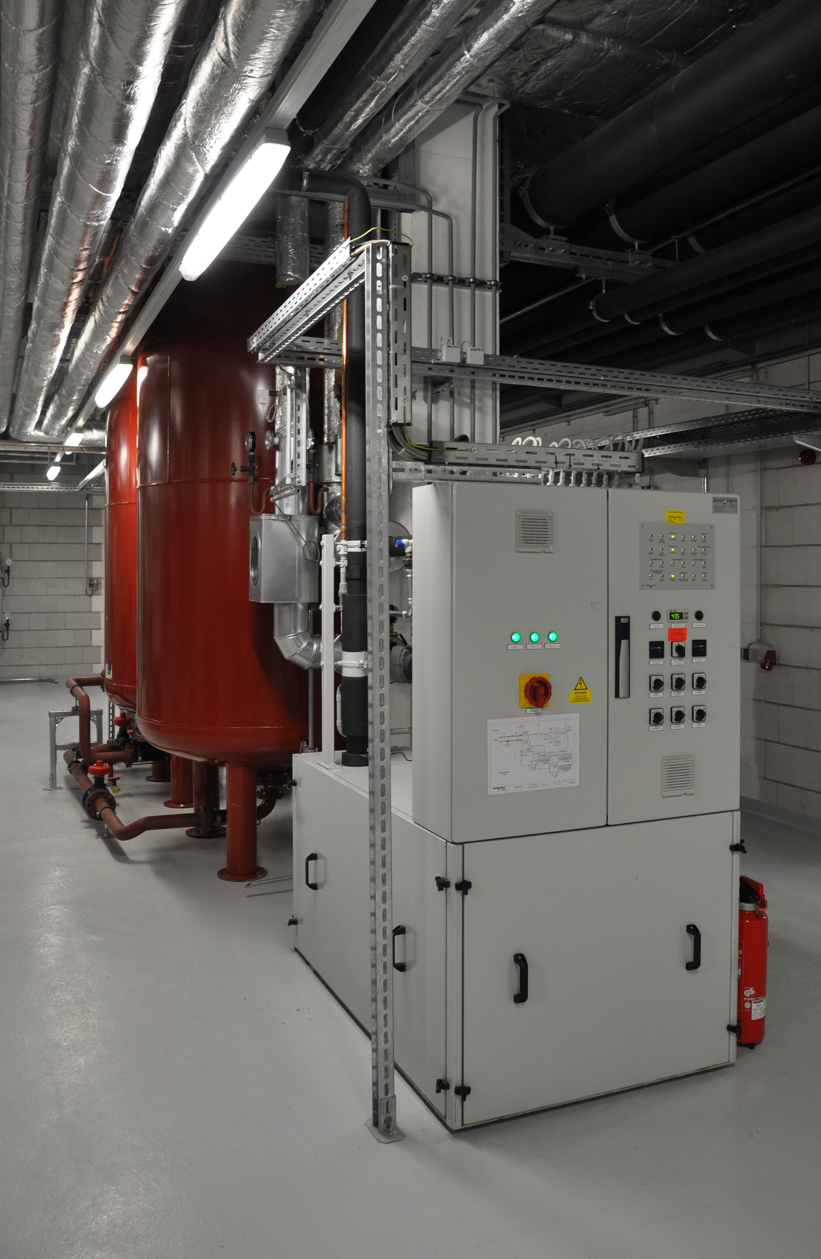 Ravensburg, Krankenhaus St. Elisabeth, Technikzentrale im Untergeschoss des neuen Bettenhauses (am Tag der offenen Tür 2013) Wärmepumpe